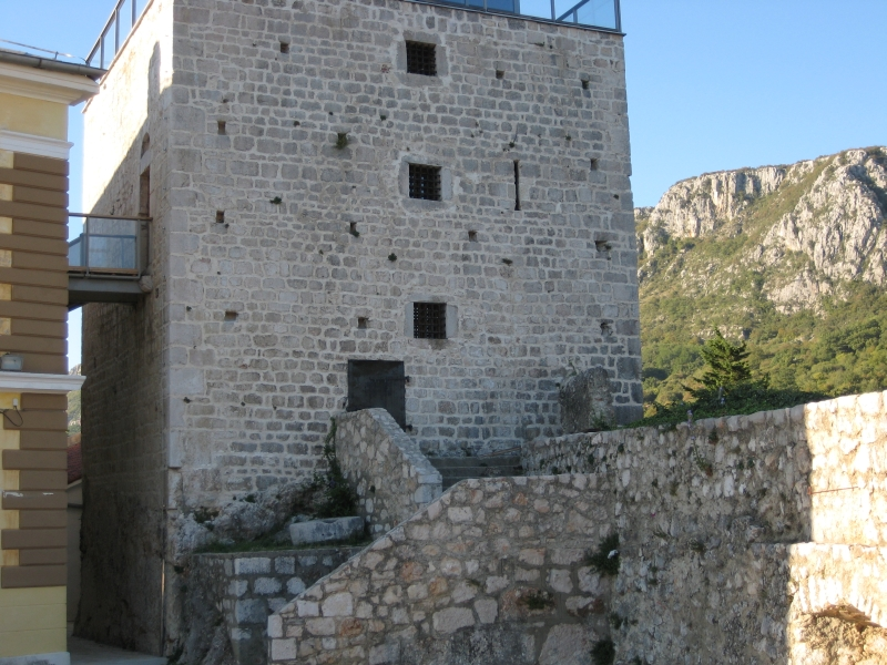 Gradina u Bribiru, Croatia